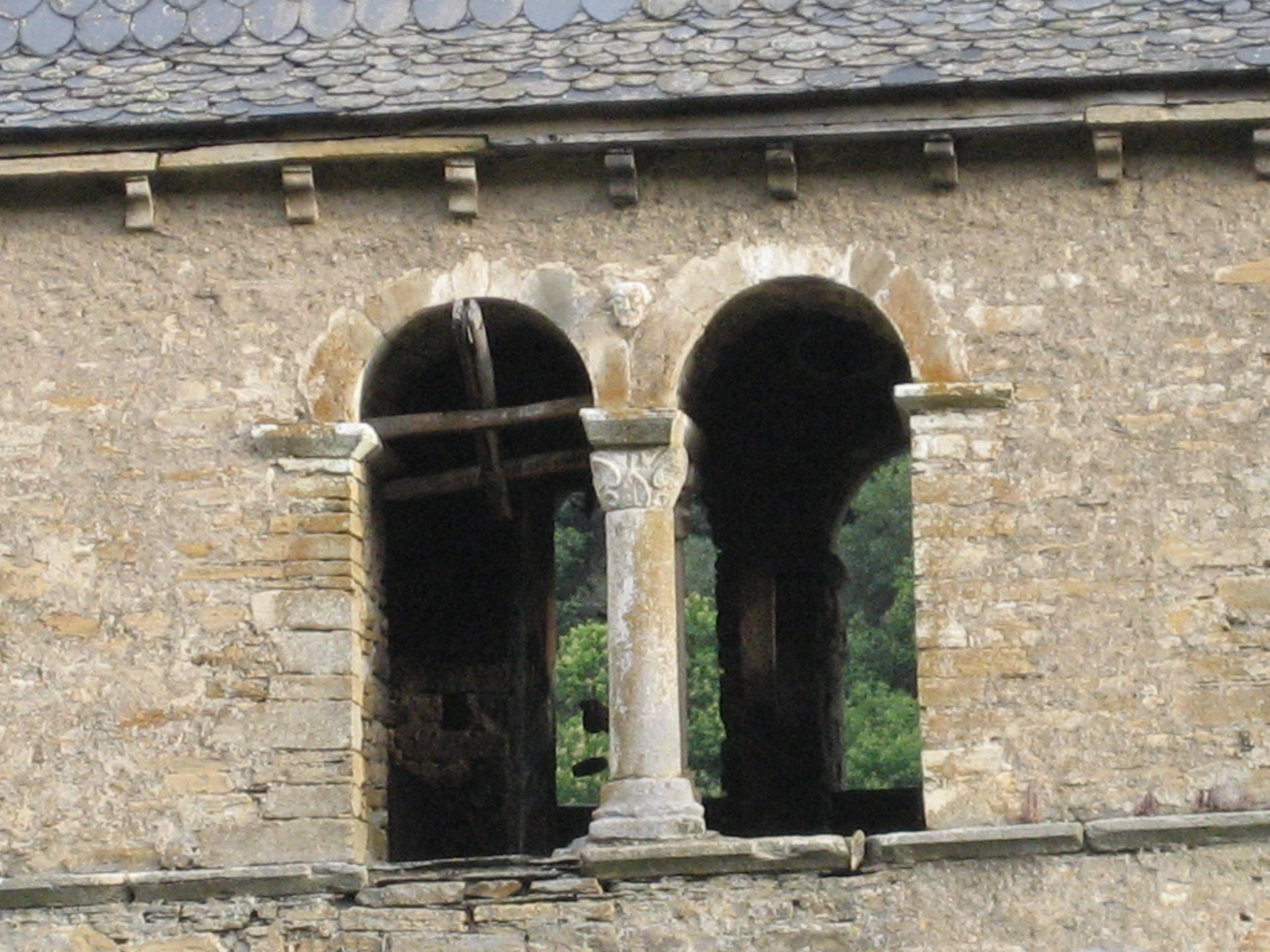 Detalle de las columnas romanicas del campanario de la iglesia del Monasterio de San Pedro de Montes